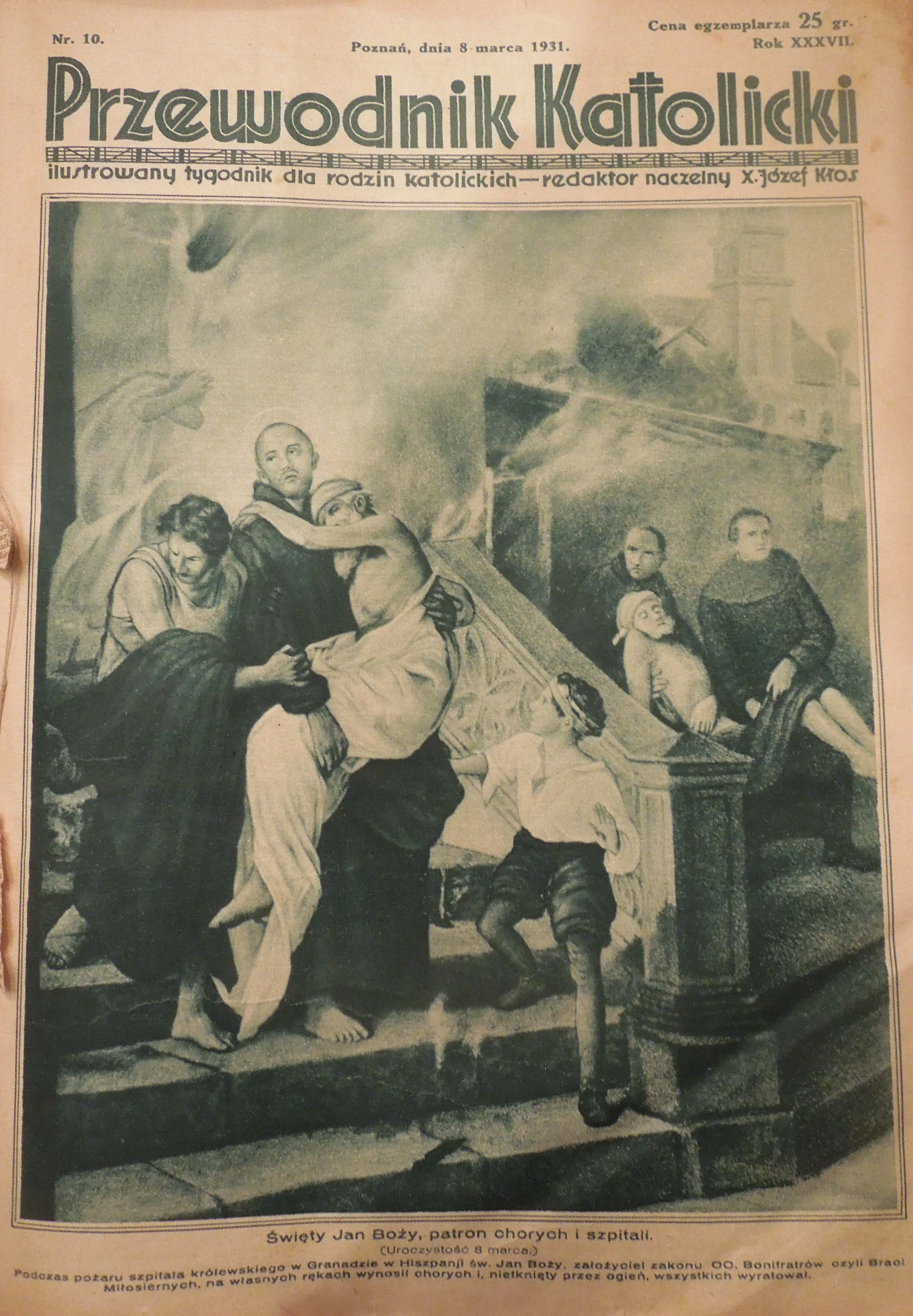 Przewodnik Katolicki - numer z marca 1931 roku. Na okładce Jan Boży. Ze zbiorów Muzeum Sztuki Użytkowej w Kaliszu